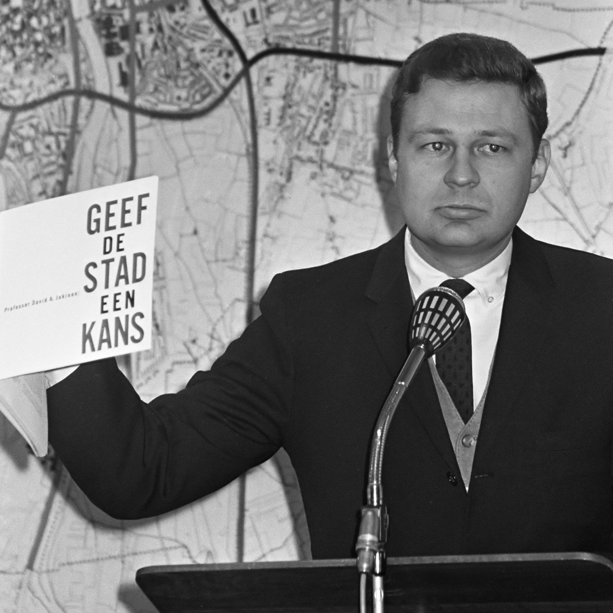 Vanmiddag heeft prof. dr. David A. Jokinen zijn boek "Geef de stad een kans" nader toegelicht. Deze Amerikaanse verkeersdeskundige heeft 4 jaar in Nederland de grote steden en hun verkeersproblemen nader bekeken 7 december 1967